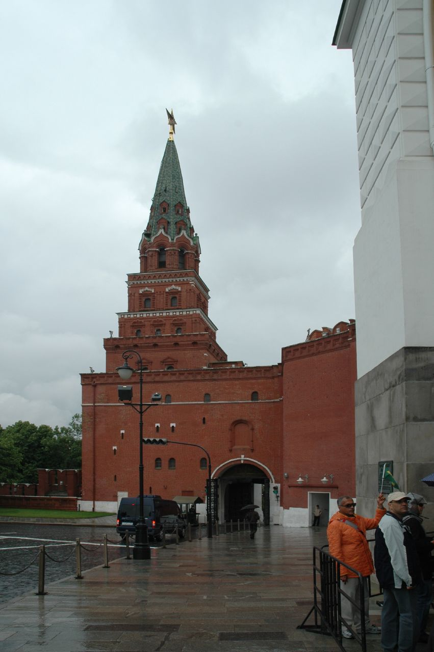 Borovitskaya Tower